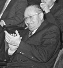 Zentralbild Müller S. 7 Motive 4.12.1954 Internationale Gäste bei der Verlegerkonferenz in Leipzig Vom 3. bis 5. Dezember 1954 wird im Leninsaal des Hauses der Deutsch-Sowjetischen Freundschaft in Leipzig die 4. Verlegerkonferenz durchgeführt, die sich mit der Rolle, den Aufgaben und den Perspektiven des Verlagswesen und des Buchhandels in der Deutschen Demokratischen Republik beschäftigt. Der Konferenz wohnten Gäste aus der Sowjetunion, den Volksdemokratischen Ländern, der Volksrepublik China, sowie aus Österreich bei. UBz: Blick in die Konferenz: In der ersten Reiehe 2. von rechts: Karl Wloch, Leiter des Amtes für Literatur und Verlagswesen, daneben der Gast aus der Chinesischen Volksrepublik, Yen Pao-Yu. Information added by Wikimedia users. Ausschnitt (nur Karl Wloch) aus nachfolgend beschriebenem Bild